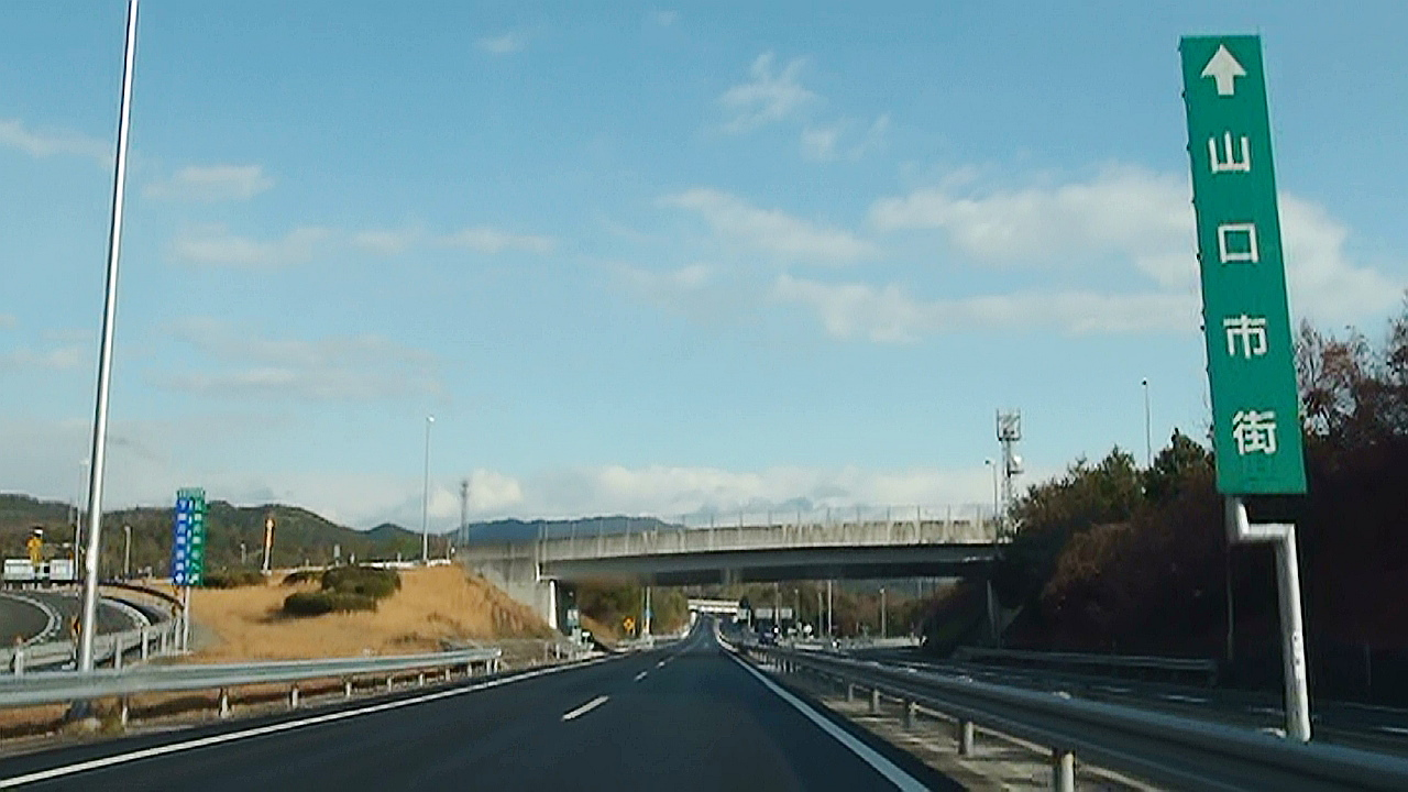 2012年1月 嘉川IC付近